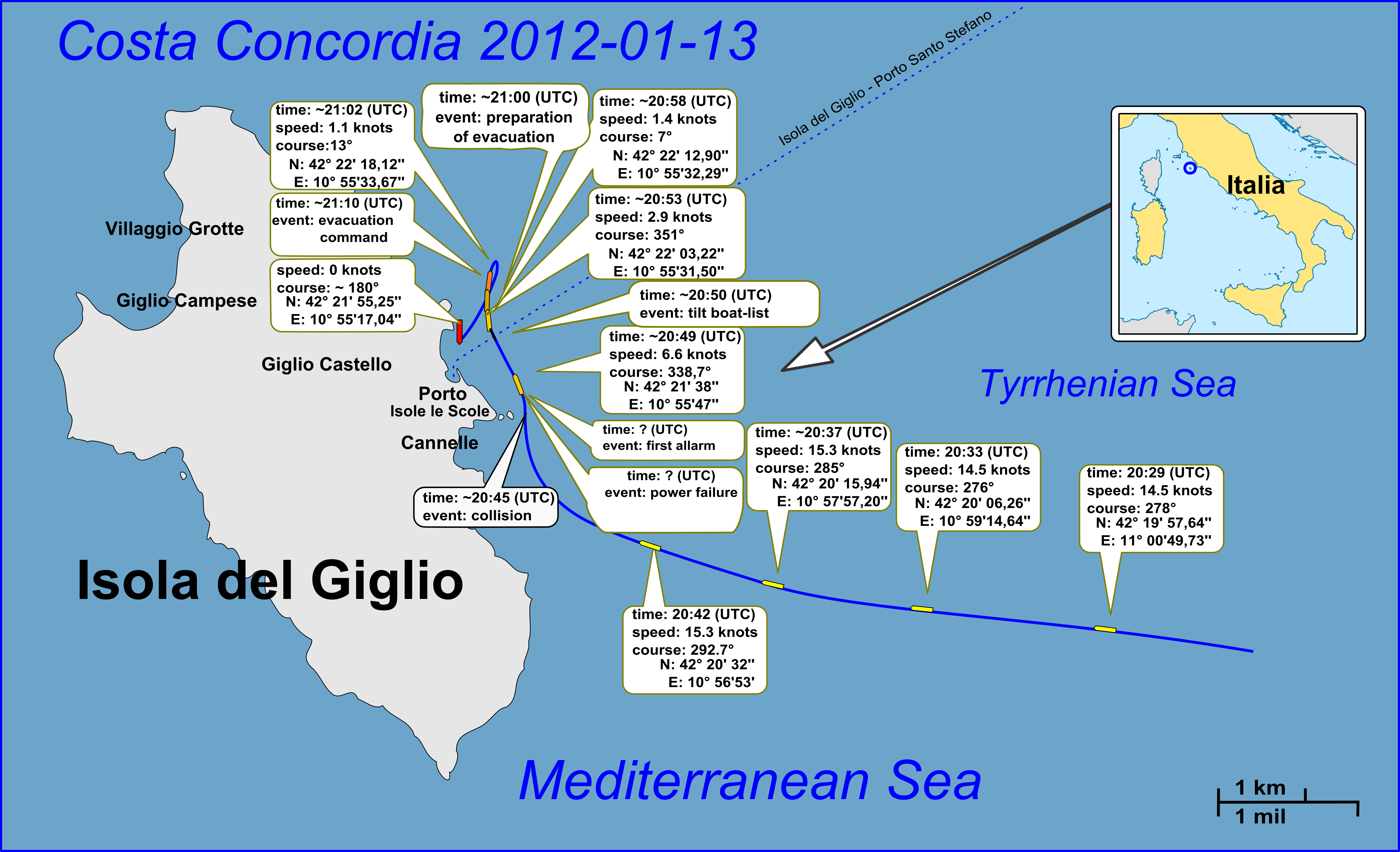 Mappa italiana degli eventi dell'incidente della Costa concordia